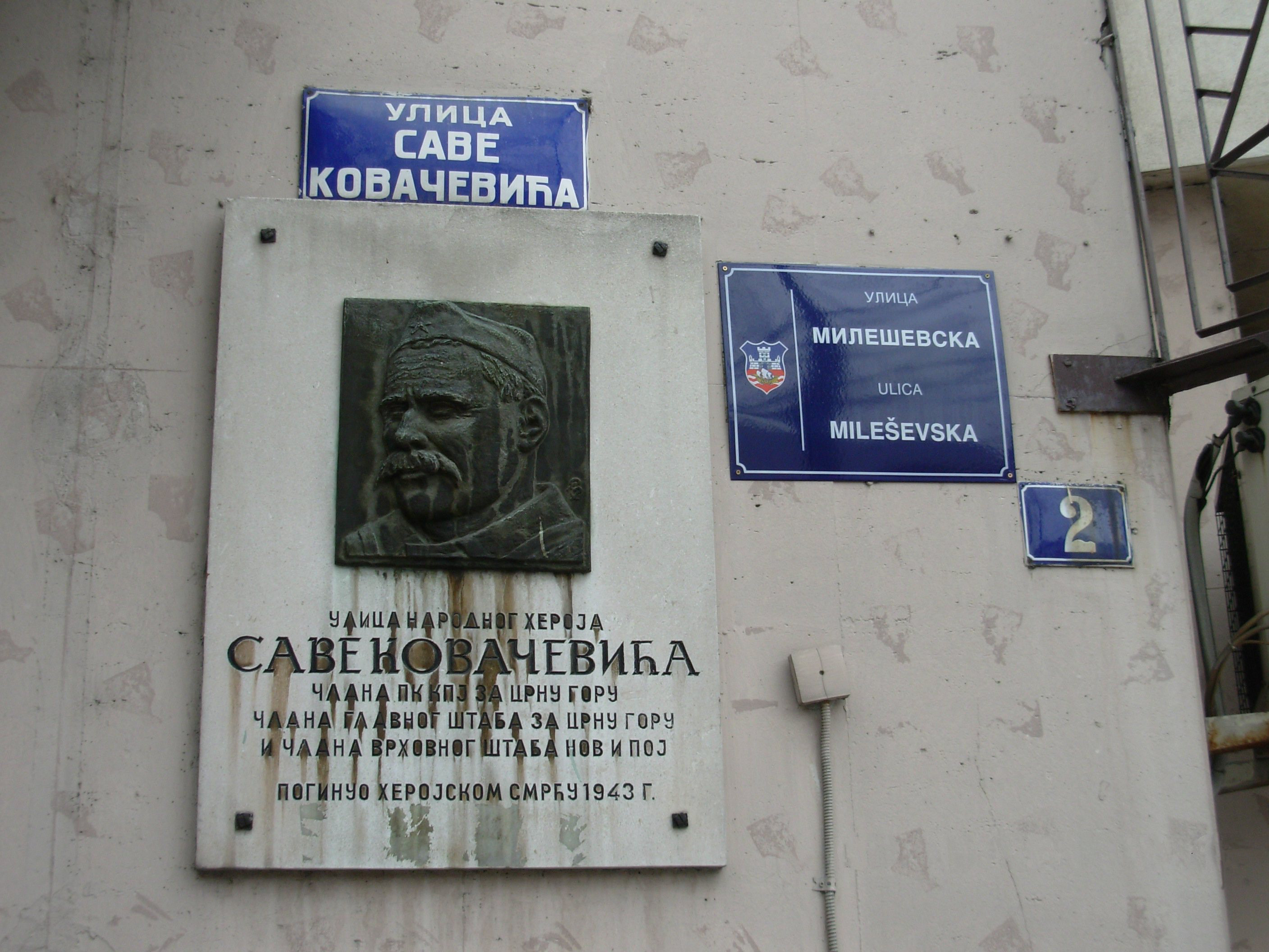 Табла у бившој улици Саве Ковачевића, данас Милешевска, Београд. Сликао Голдфингер